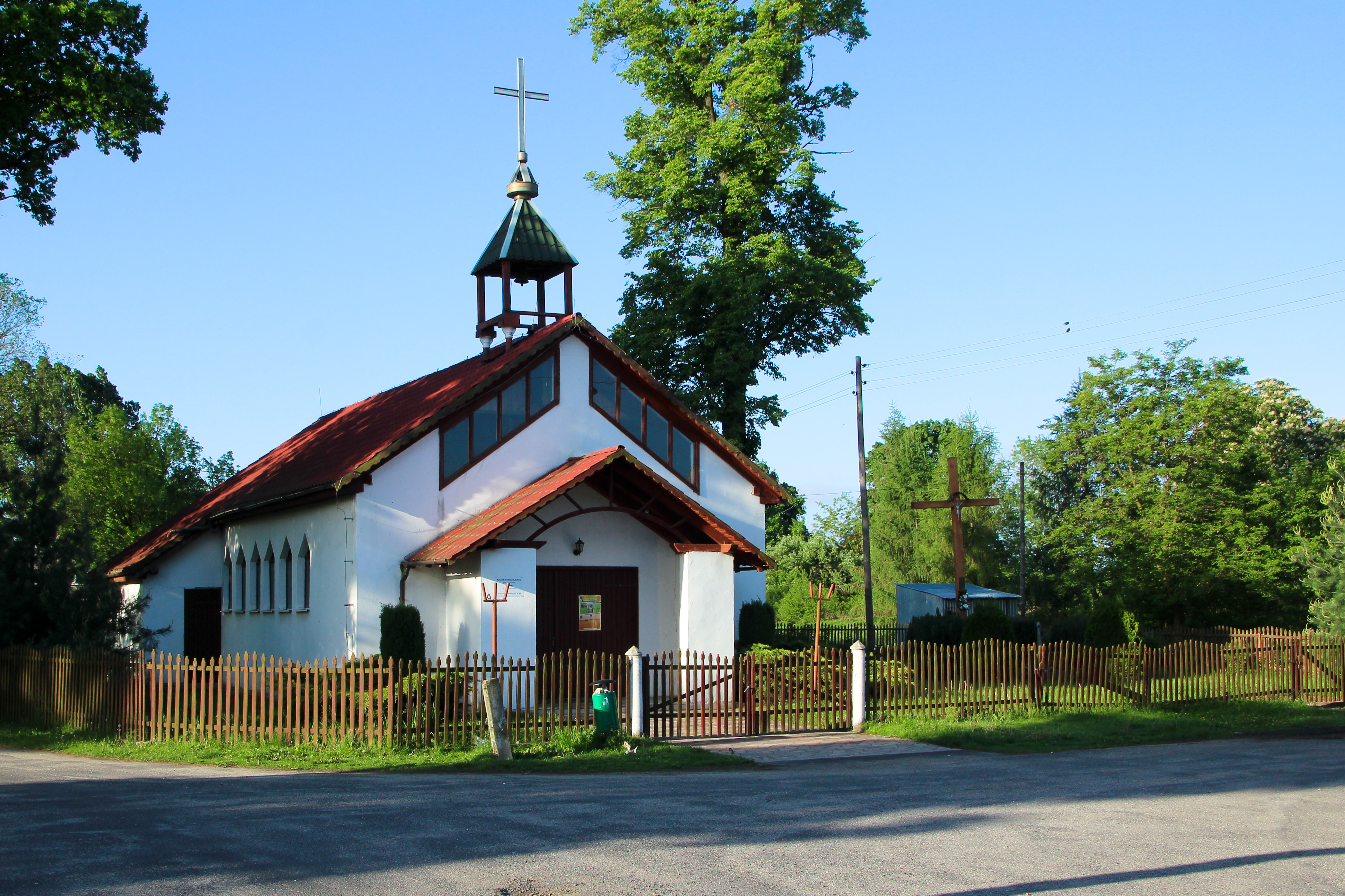 Żarka nad Nysą - kościół rzym.kat.